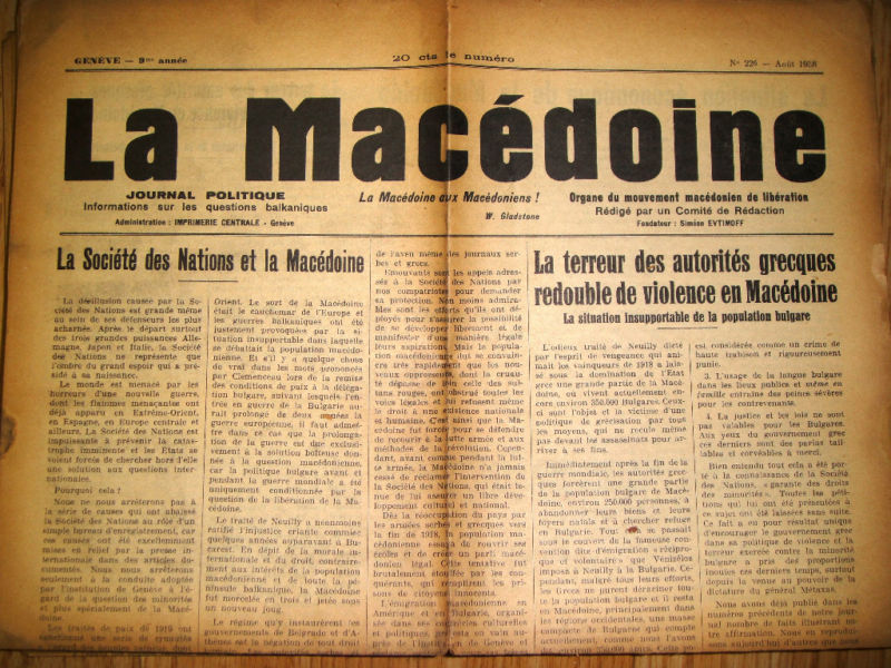 Августовски брой на "La Macédoine".